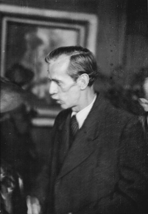 Otto Nagel Otto Nagel Der Leiter des Landesverbandes Brandenburg des Kulturbundes und Mitaussteller in den Ausstellungsräumen des Westens Copyright Walter Heilig Berlin-Britz Dörchläuchtingerstr. 20 Abgebildete Personen: Nagel, Otto Prof.: Maler, Präsident der Akademie der Künste (AdK), Nationalpreisträger, Vaterländischer Verdienstorden (VVO) in Gold, DDR (GND 118586300)